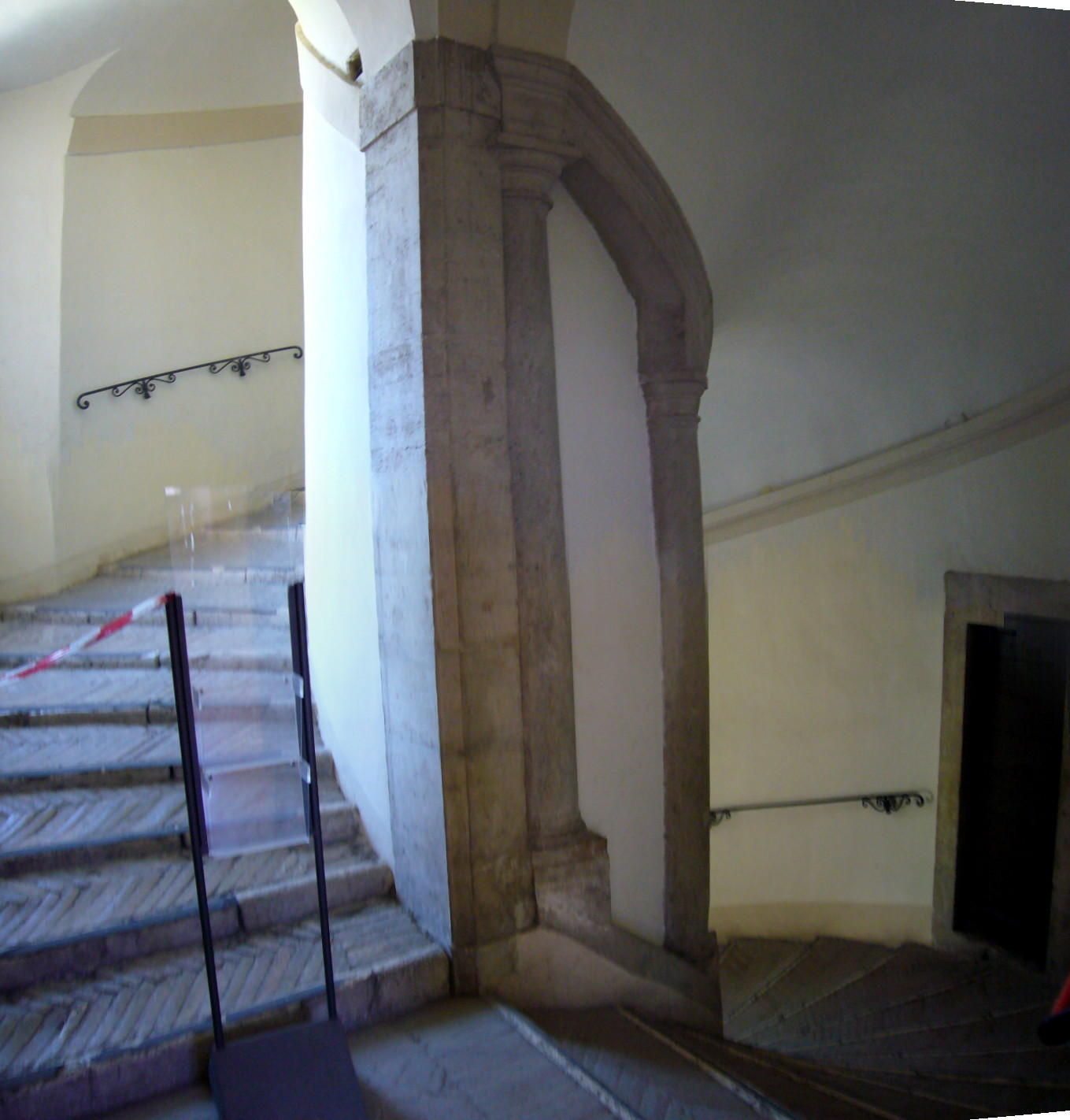 Roma, Villa Giulia: scala interna a chiocciola